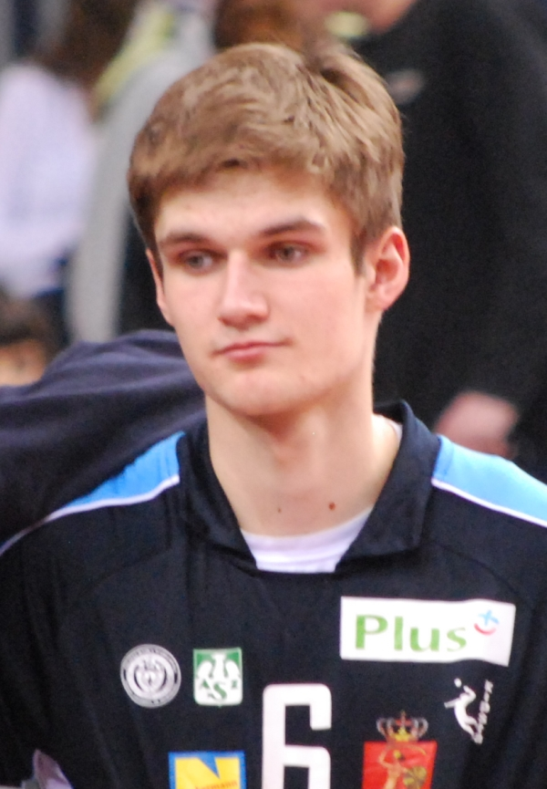 Karol Kłos